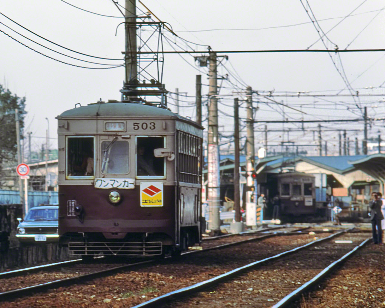 廃線前の西鉄電車